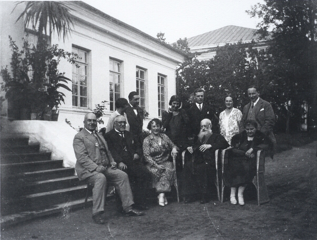 Przed oficyną pałacową siedzą od lewej: Feliks Zawadzki, właściciel firmy księgarskiej "Zawadzki" w Wilnie i majątku Joda(?), Aleksander Lednicki, Zofia z Pac-Pomarnackich Zawadzka, biskup Edward von Ropp, kuzynka A. Lednickiego (Nitosławska?), stoją od lewej: Krystyna Zawadzka, córka Feliksa, 1°v Moraczewska, 2°v Konarkiewiczowa(?), Justyn Strumiłło, właściciel majątku Korwie, NN, Witold Jaguczański z Orzmiańskiego, Maria z Zawadzkich Gorska, córka Feliksa i prof. Wacław Lednicki